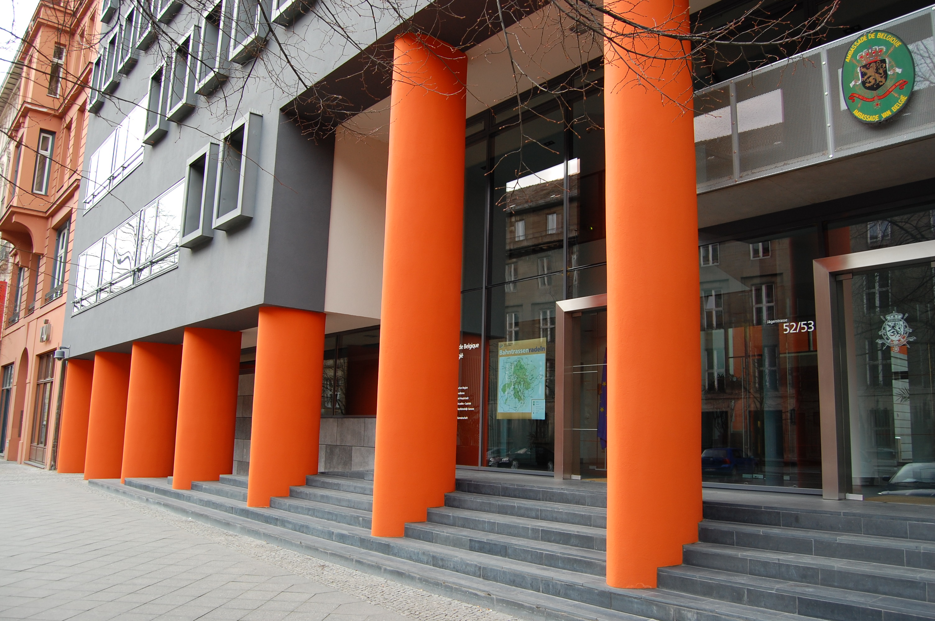 Belgian Embassy in Berlin